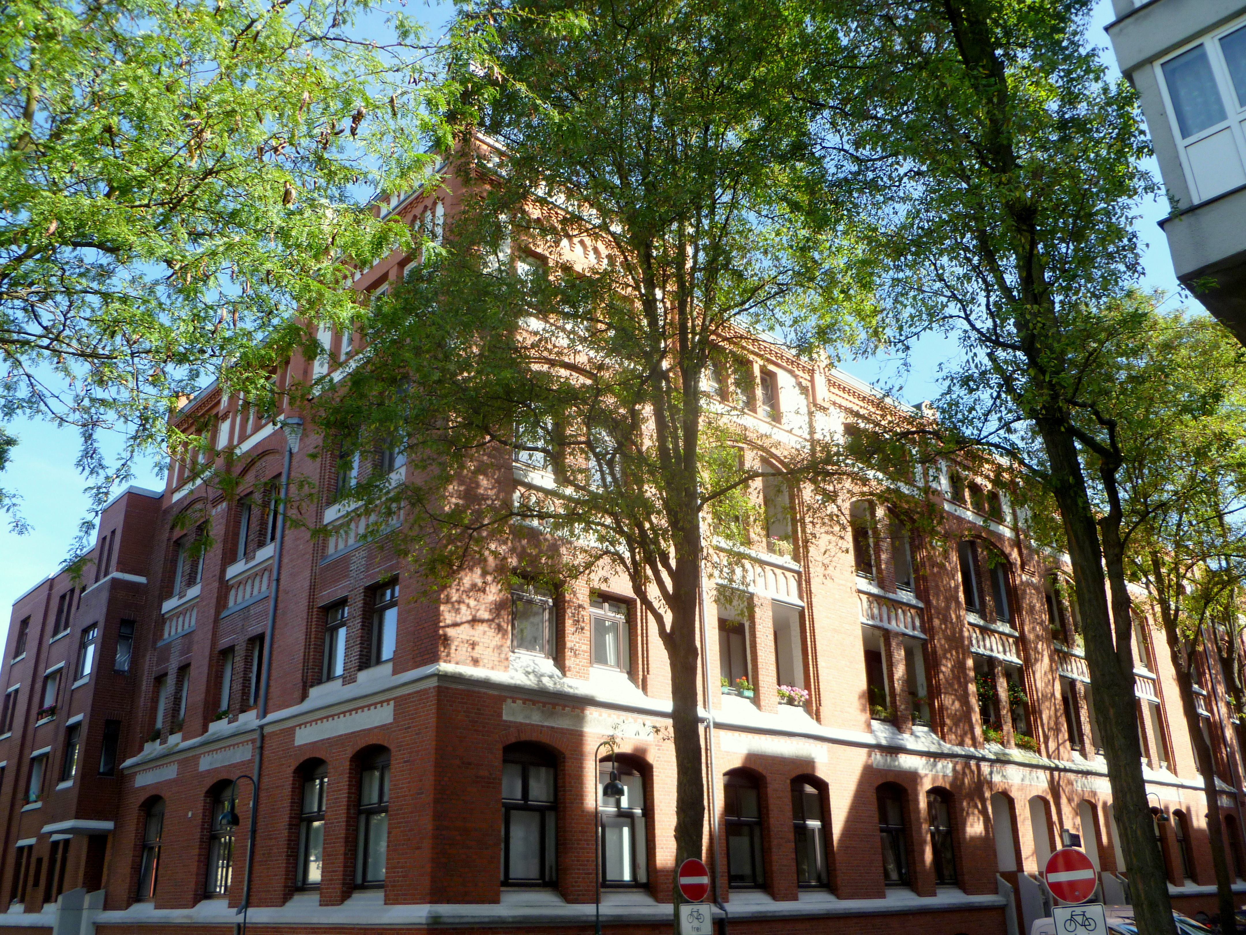 ehem Deliusfabrik in der Deliusstra0e in Aachen; Baudenkmal